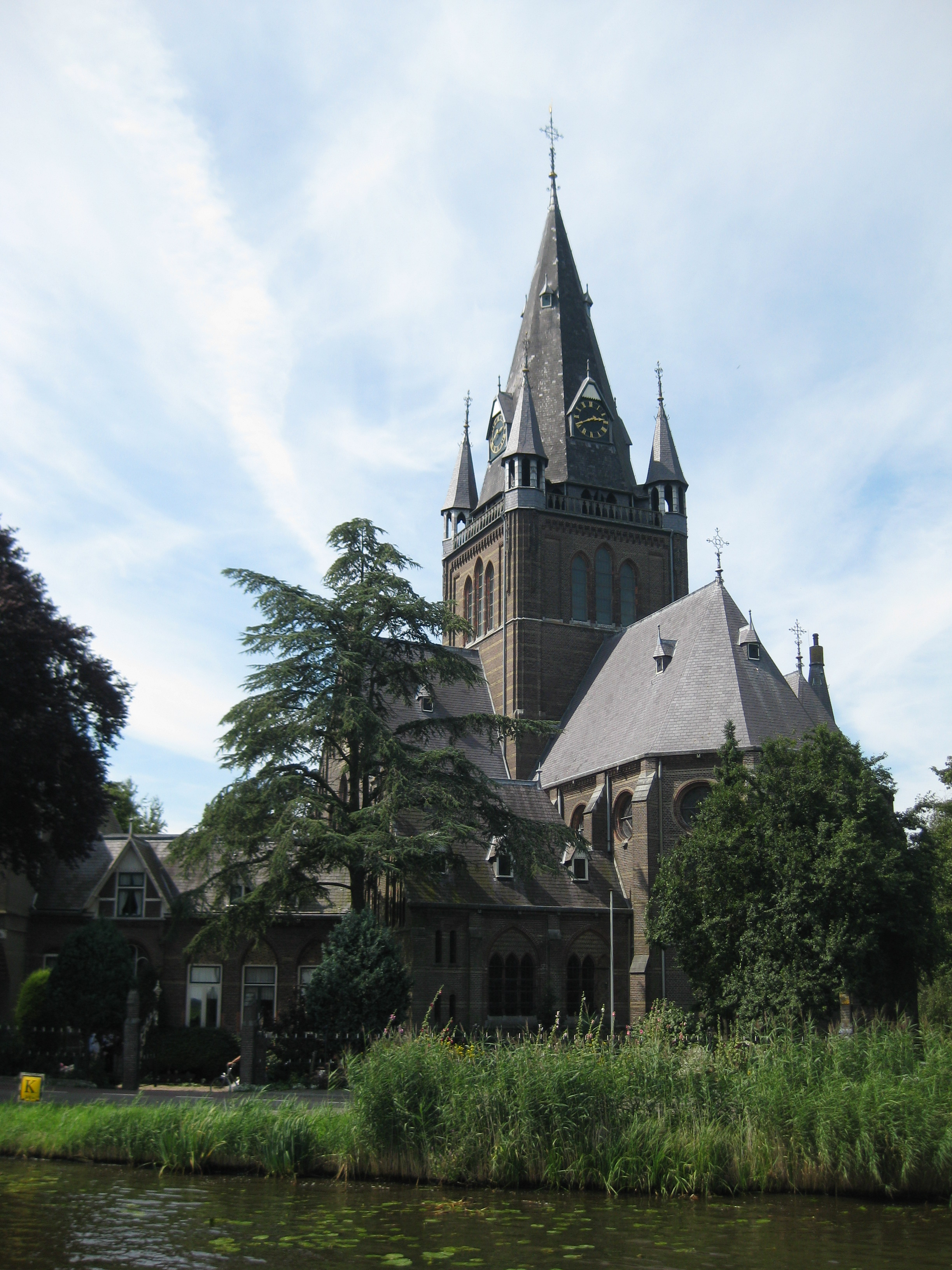 Urbanuskerk in Nes aan de Amstel, architect Joseph Cuypers 1774